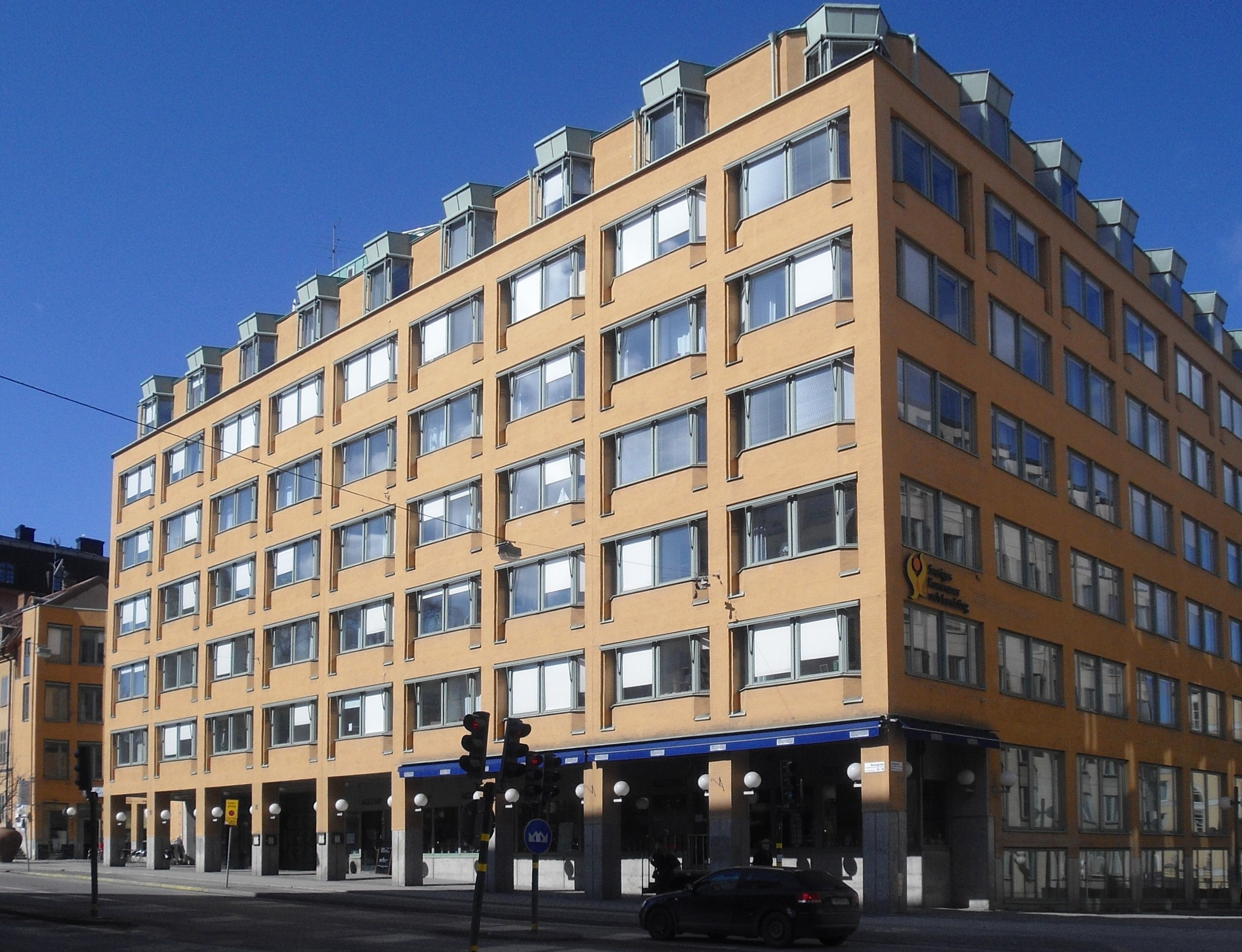 Sveriges kommuner och landsting, Hornsgatan 20, Stockholm N 59° 19.162', E 18° 4.054'